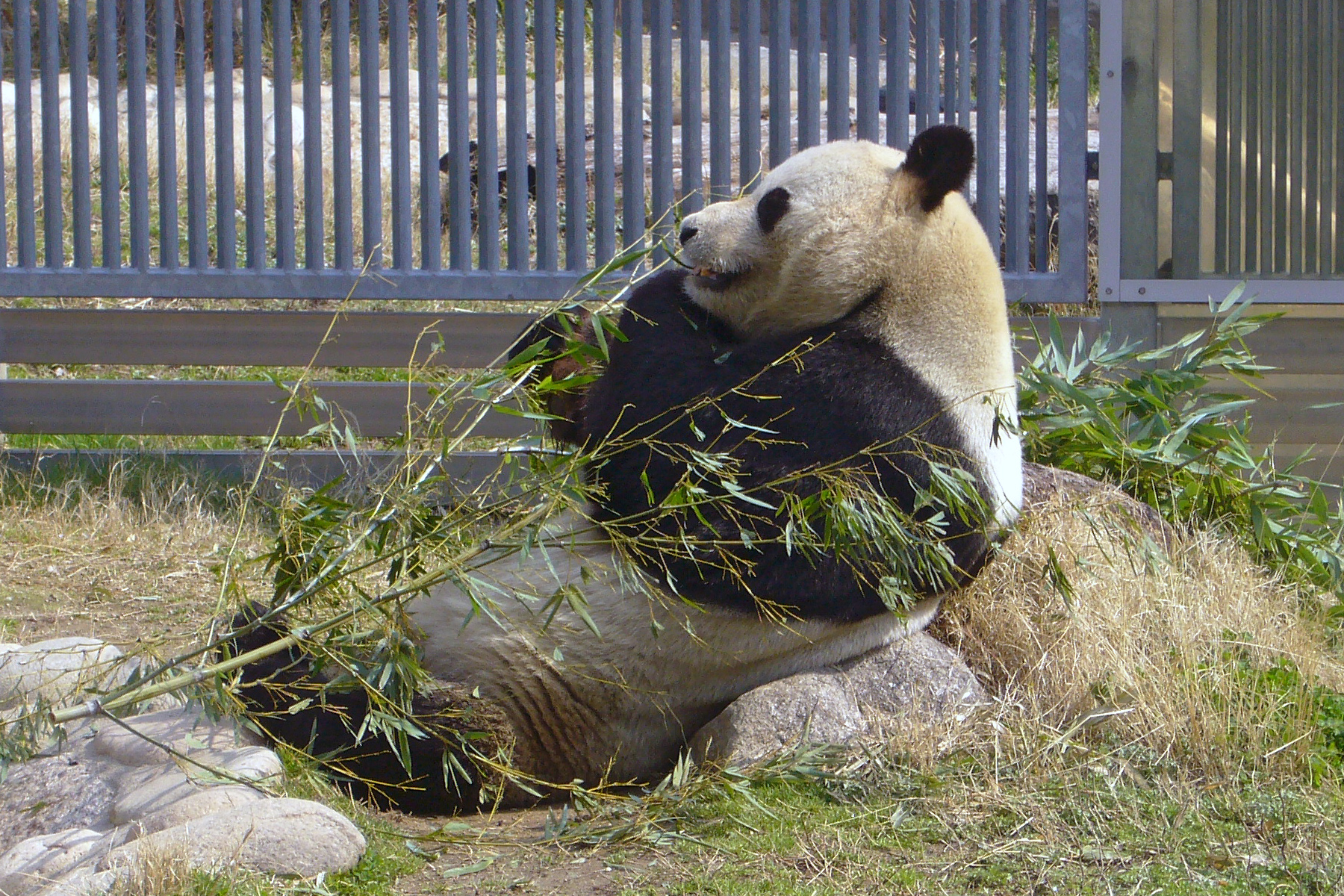 Giant Panda Ko'ko in the Kobe Oji Zoo, Kobe